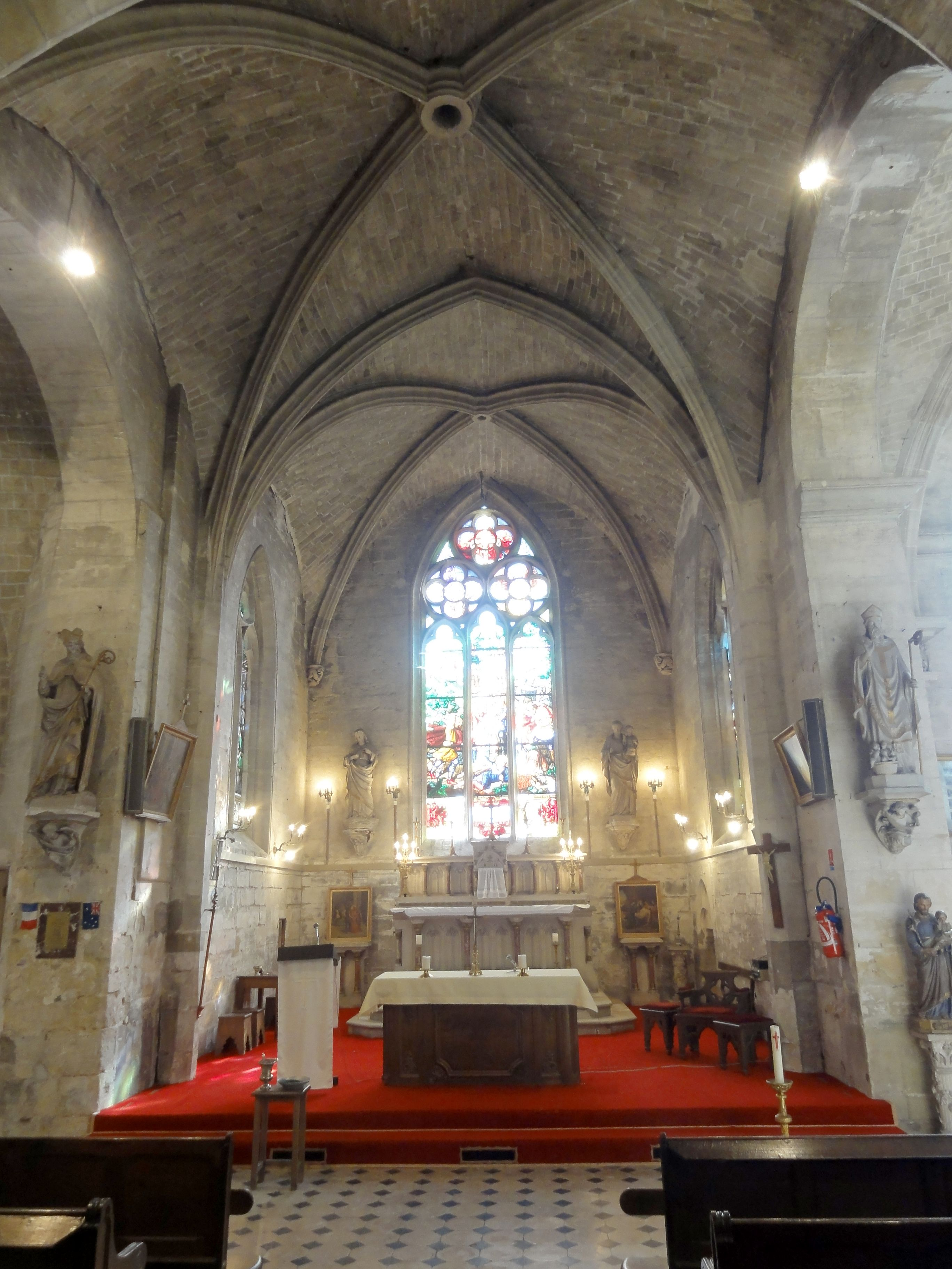 Croisée, vue vers l'est.